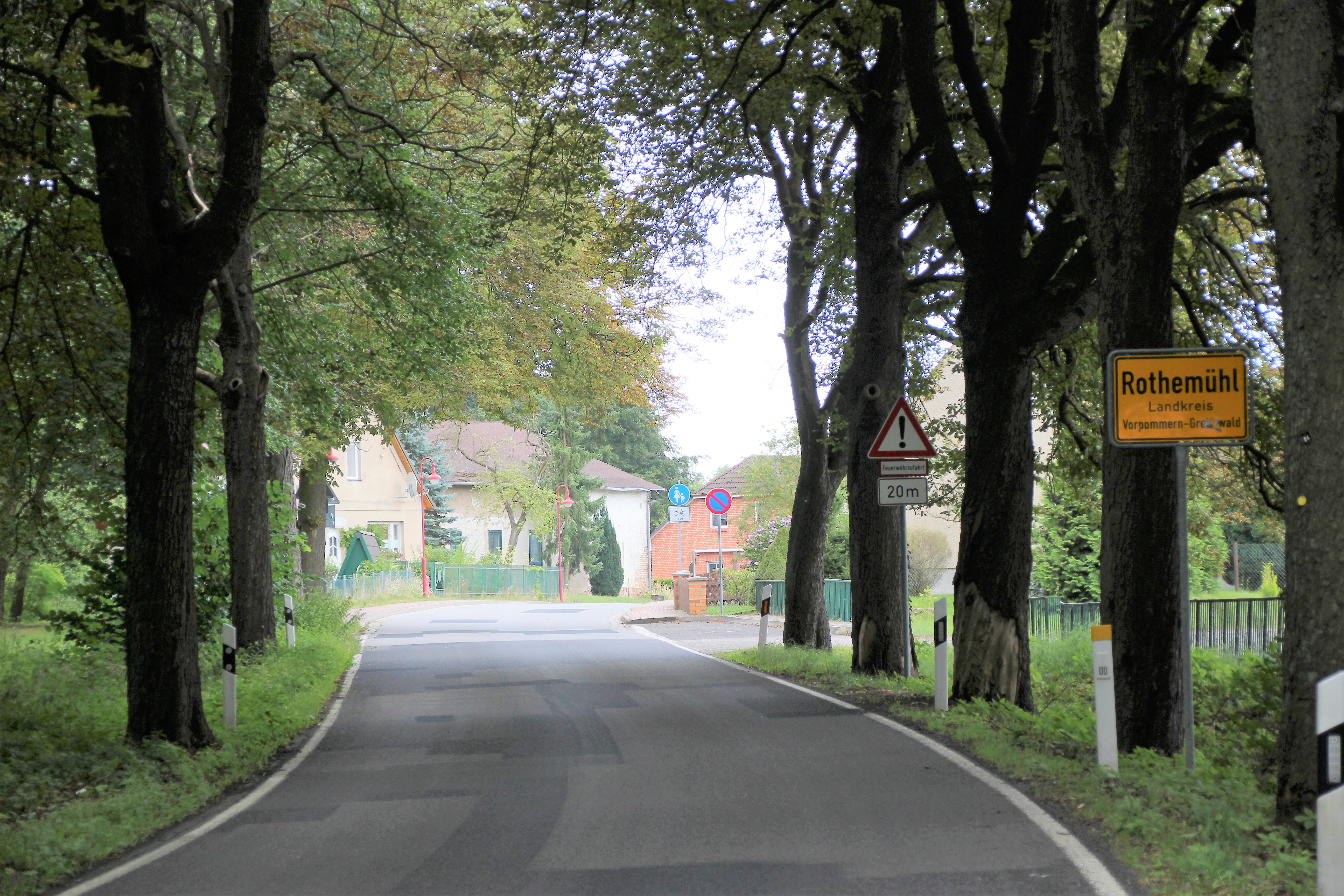 Nordwestlicher Ortseingang